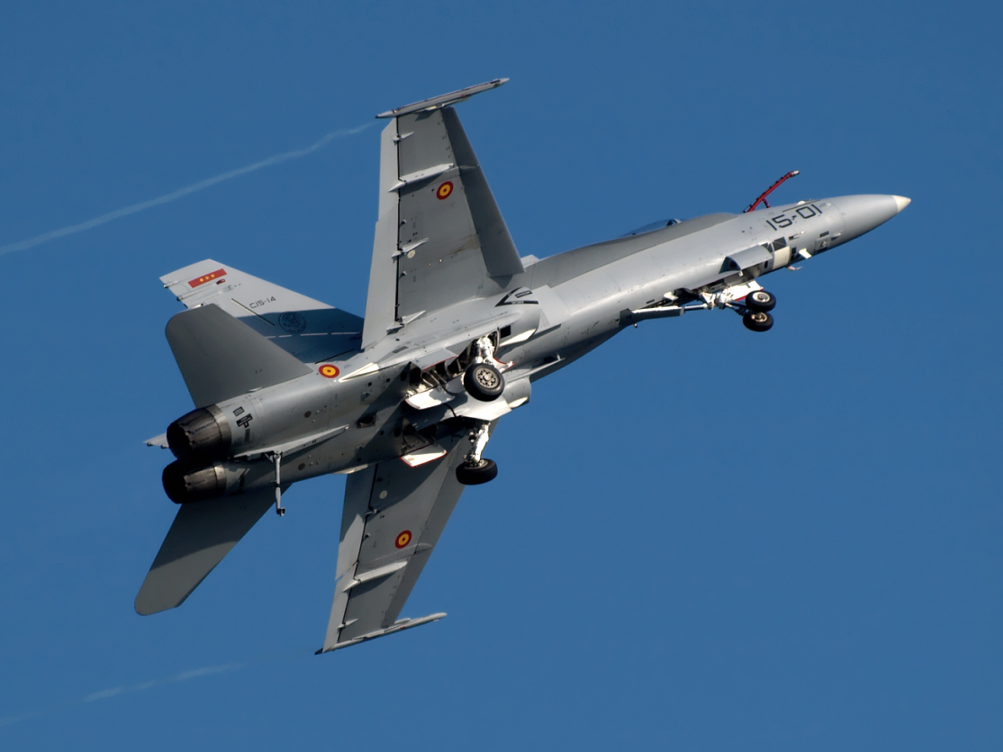 Entrenamientos de la Festa al Cel de 2008 en Barcelona. 2008 F-18 de la Fuerza Aérea Española.